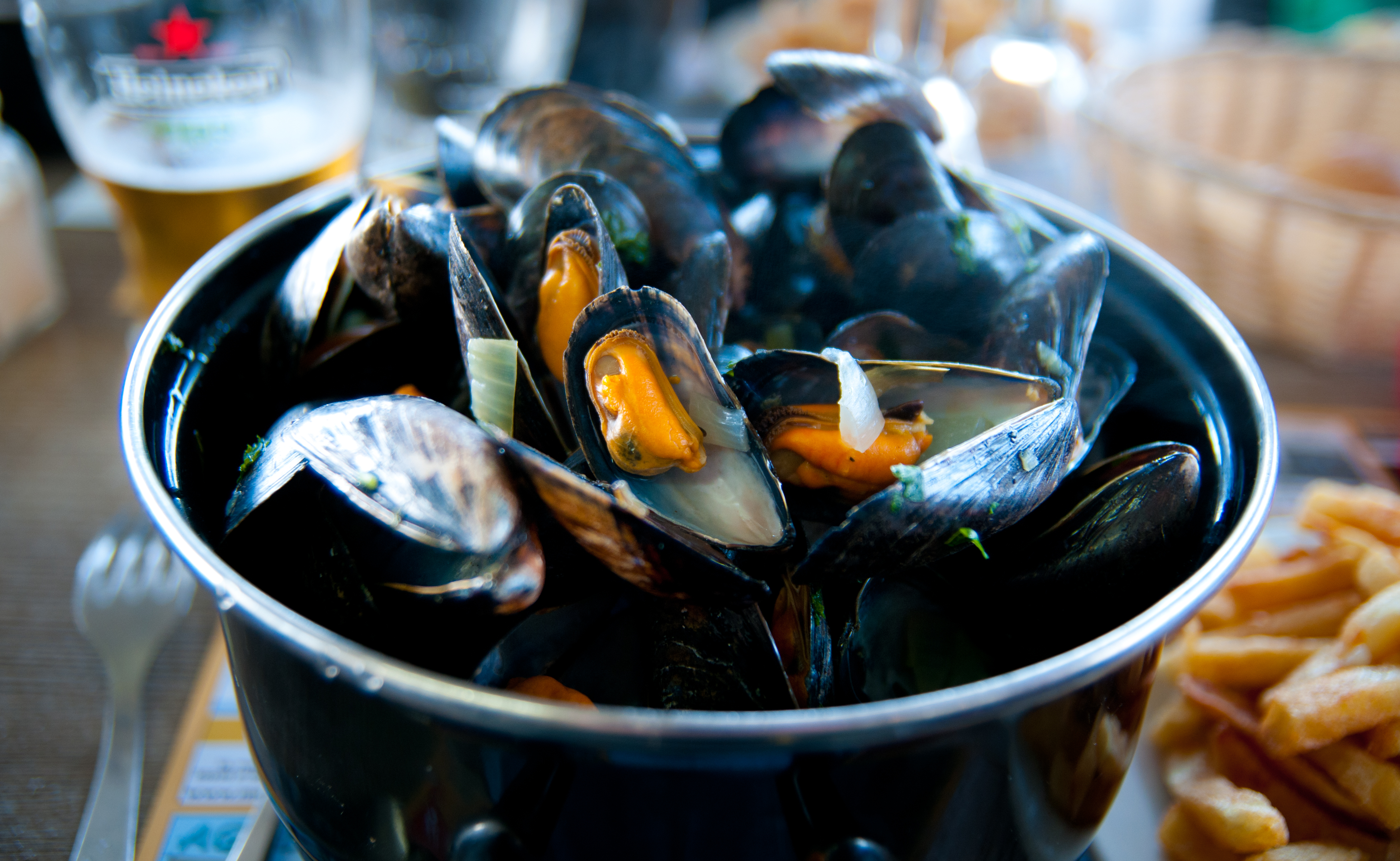 Moules frites, classic!!